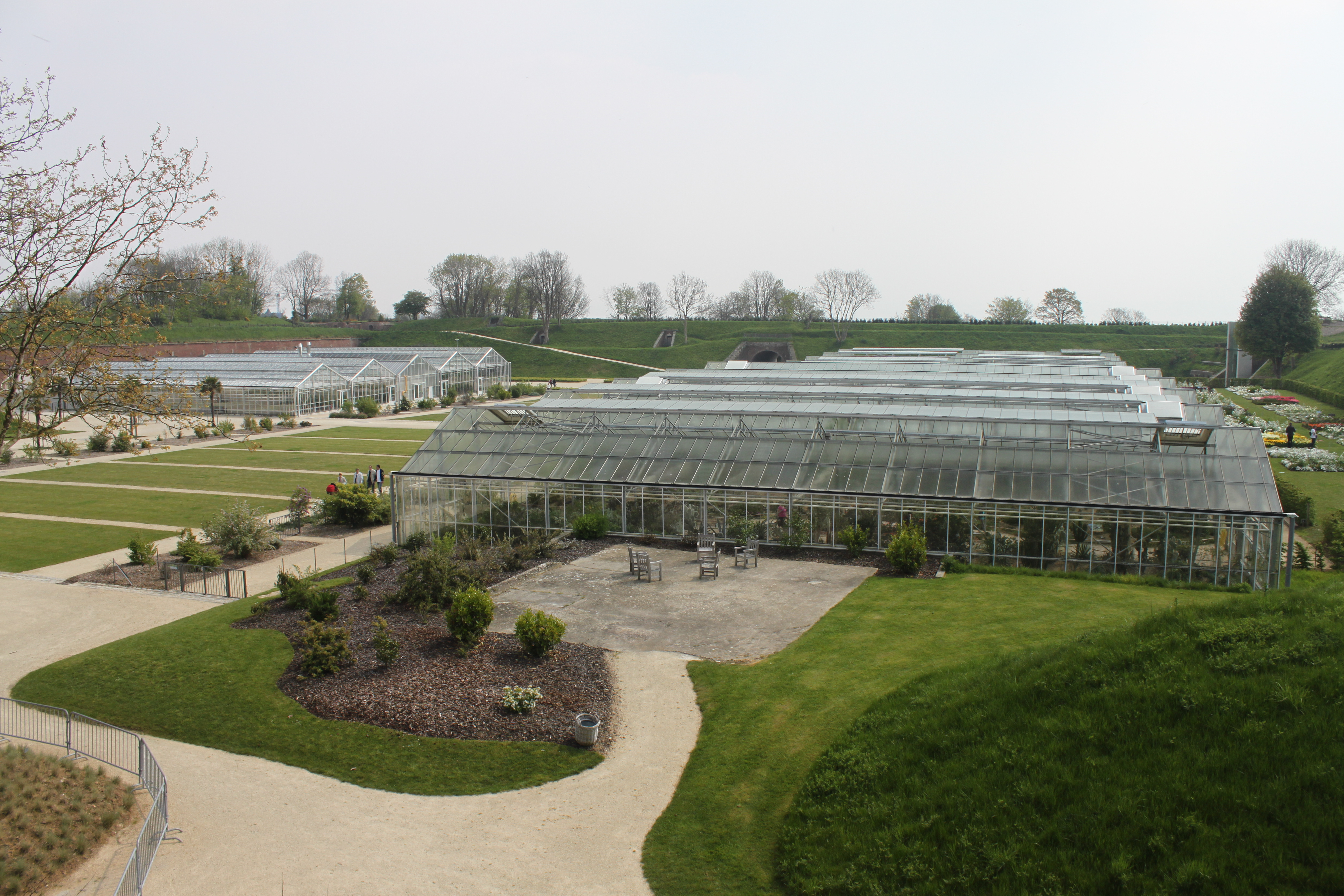 Le Havre - Jardins suspendus - vue d'ensemble